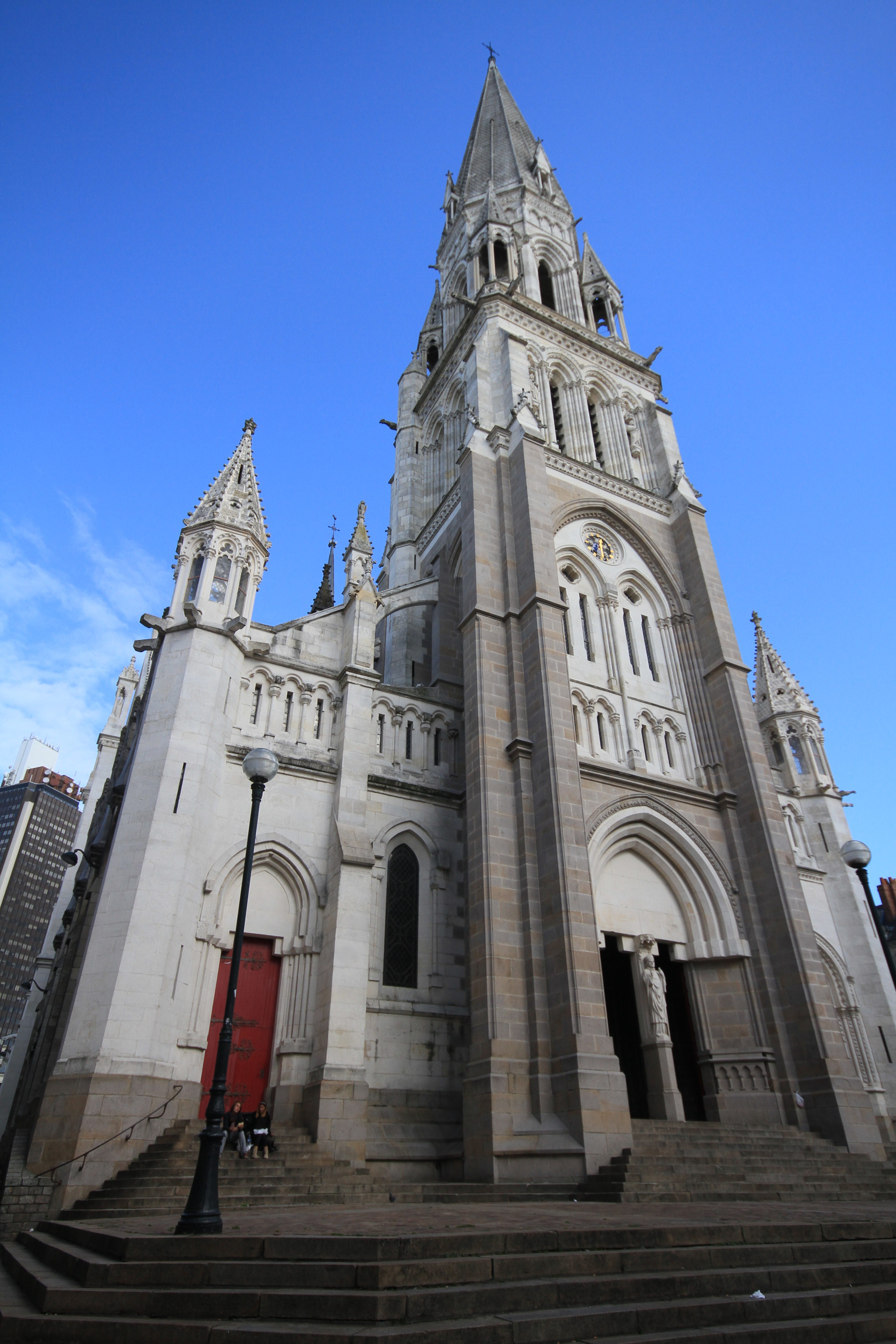 Vue prise de la place prise de la rue Affre This building is en partie classé, en partie inscrit au titre des Monuments Historiques. .